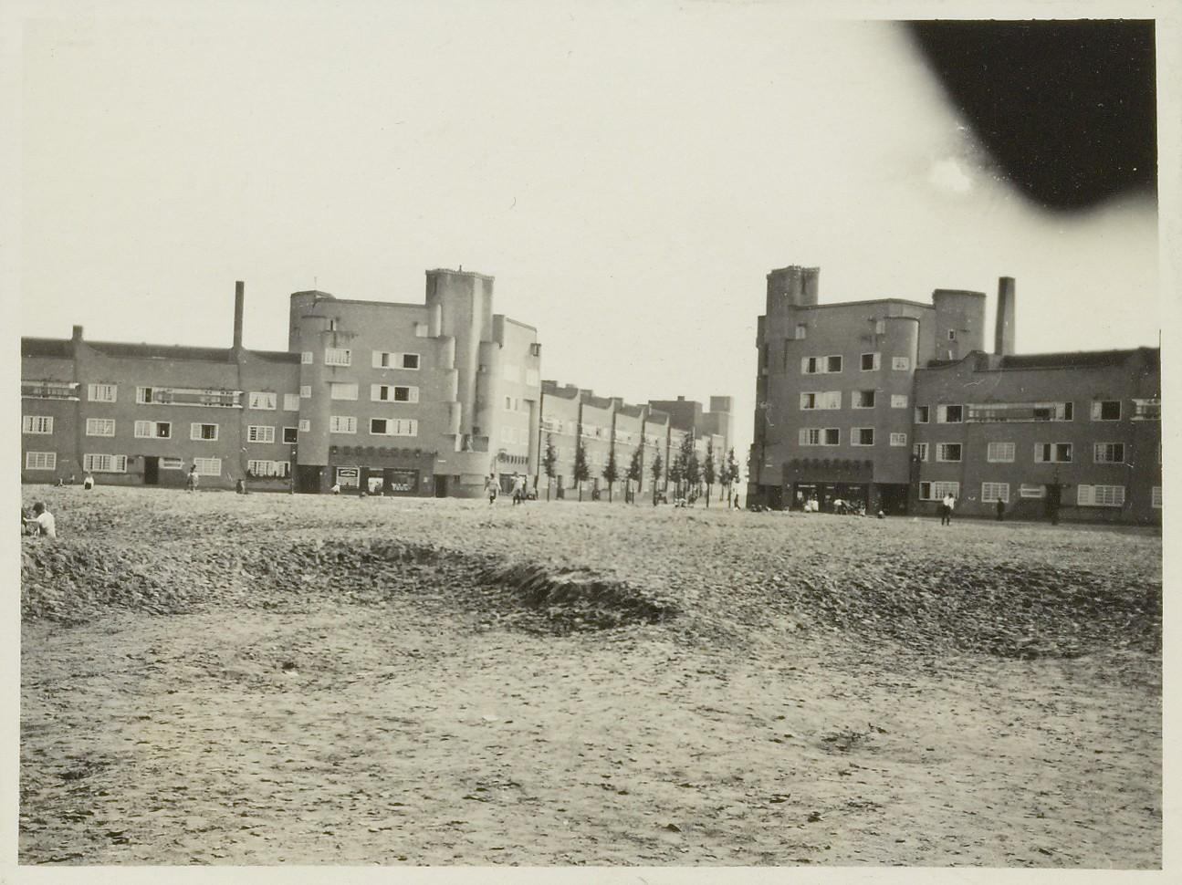 Beschrijving De Burgemeester Tellegenstraat, gezien naar de ingang van de Pieter Lodewijk Takstraat Documenttype foto Vervaardiger Onbekend Anoniem Collectie Collectie Stadsarchief Amsterdam: foto-afdrukken Datering 1923 ca. Geografische naam Pieter Lodewijk Takstraat Burgemeester Tellegenstraat Inventarissen Afbeeldingsbestand ANWO00191000022